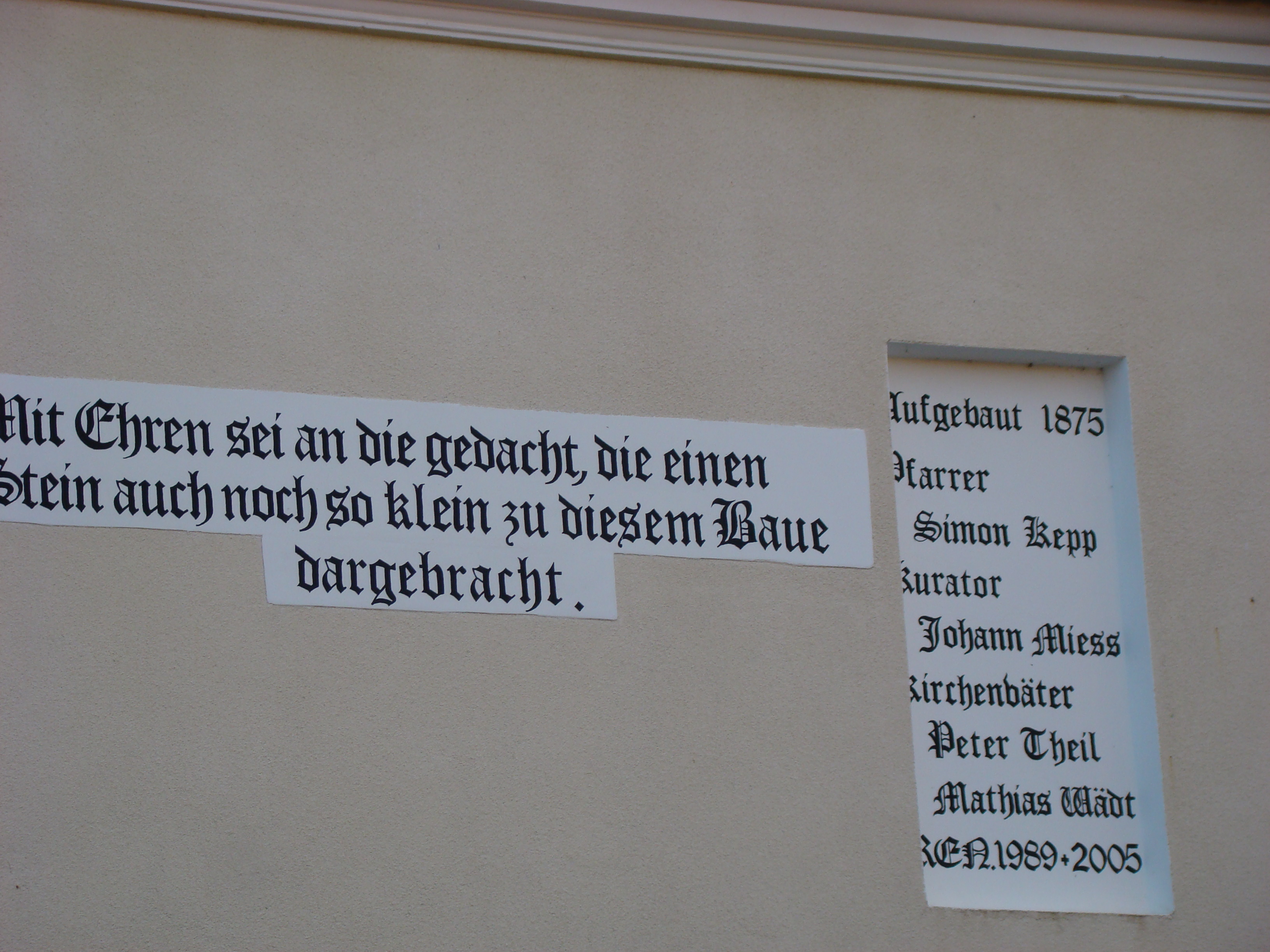 Biserica evanghelică fortificată din Șona